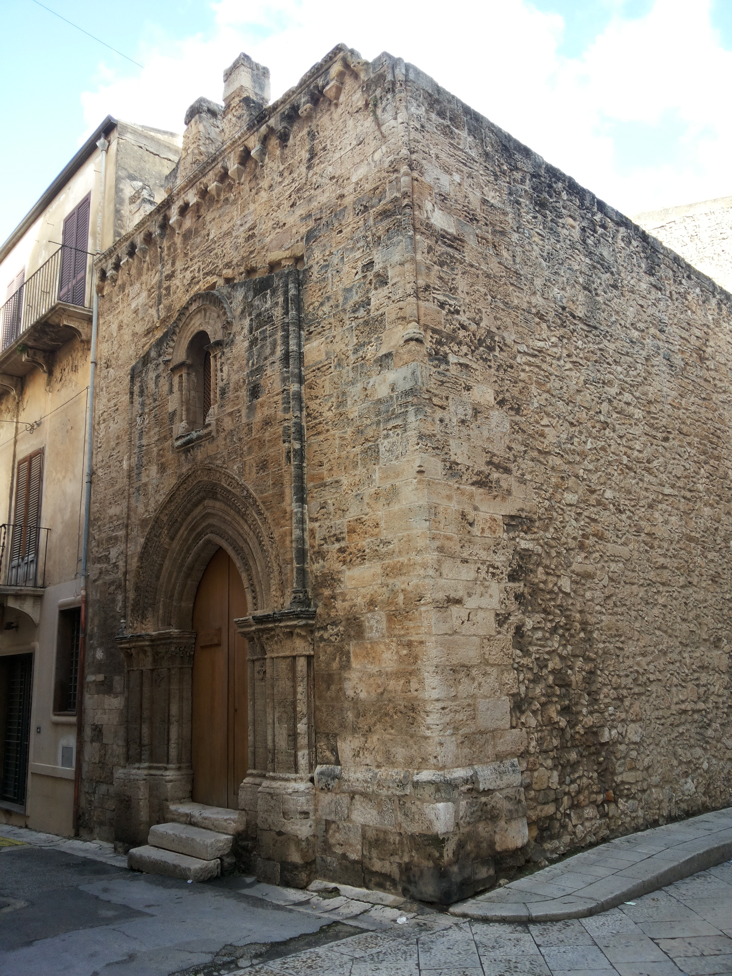 Chiesa di San Tommaso (Alcamo) - Vista laterale